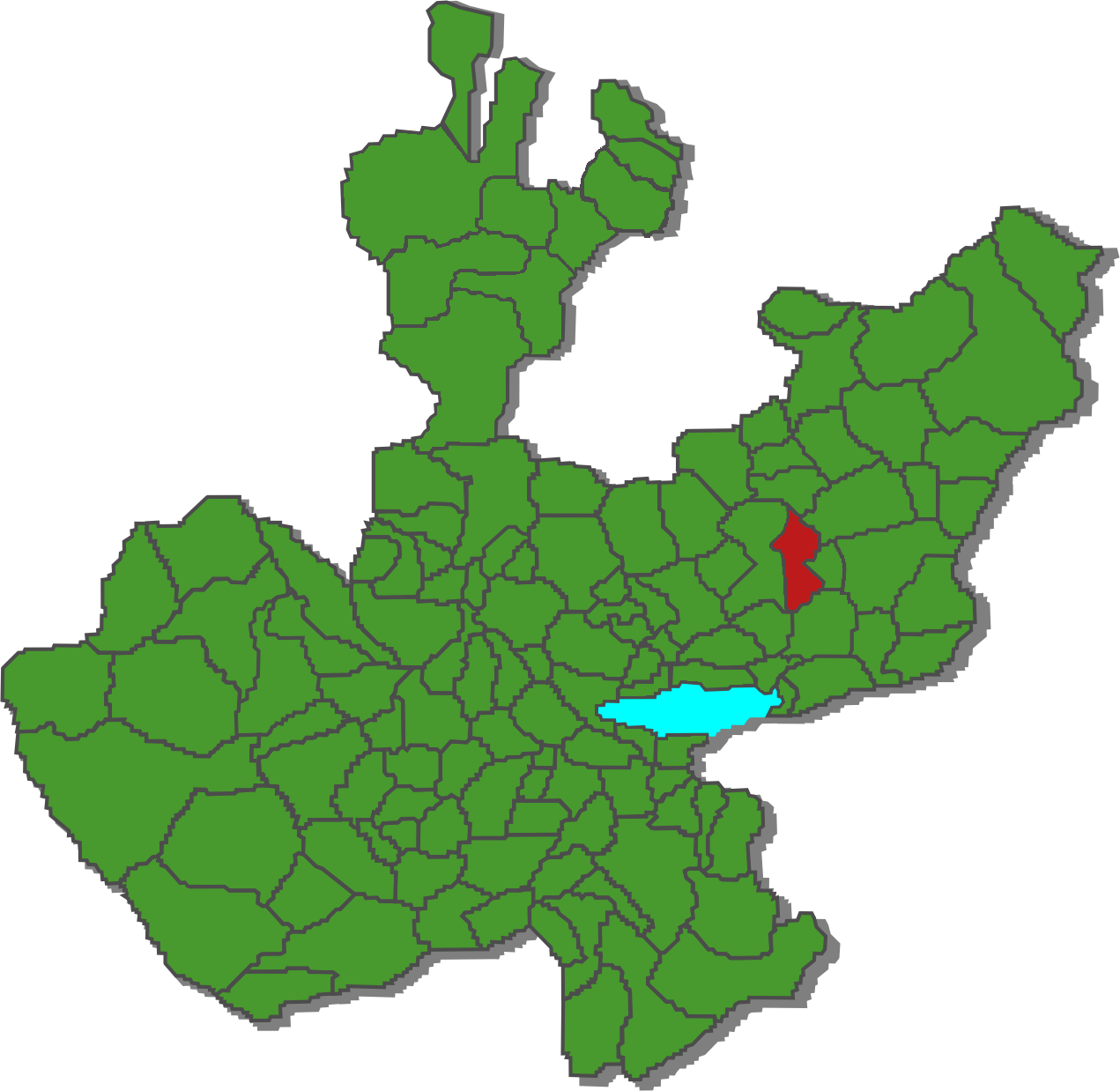 Ubicacion del municipio Capilla de Guadalupe en el mapa de Jalisco